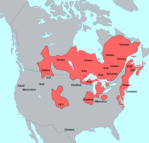 Le mot Femme dans les différents dialectes algonquiens